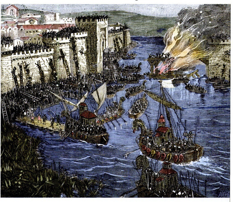 Attacco vichingo a Parigi dell'845